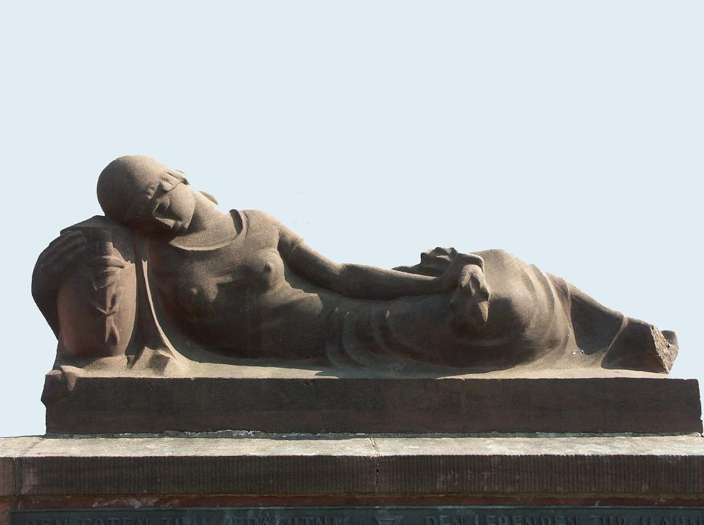 War Memorial - Krieger-/Kriegsopferdenkmal - Mémorial de guerre